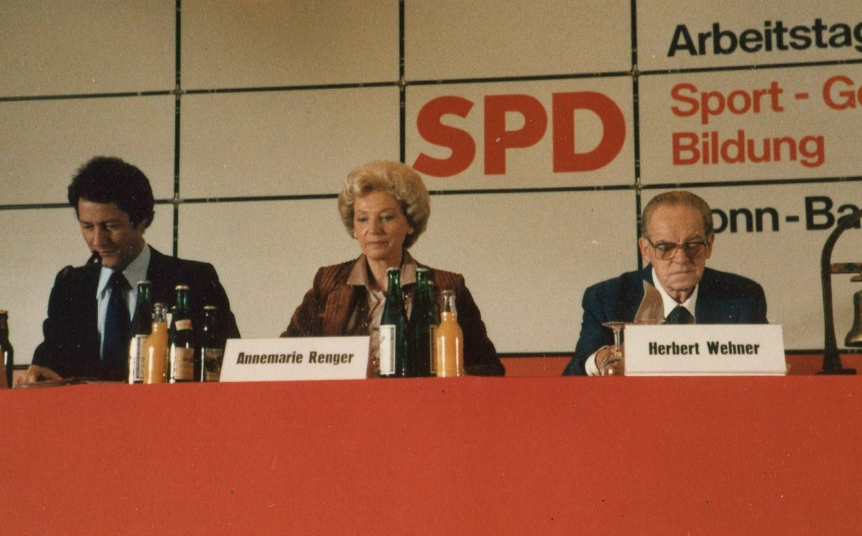 gemeinsame Tagung mehrer Arbeitskreise der Bundes-SPD